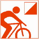 סמל ניווט אופניים